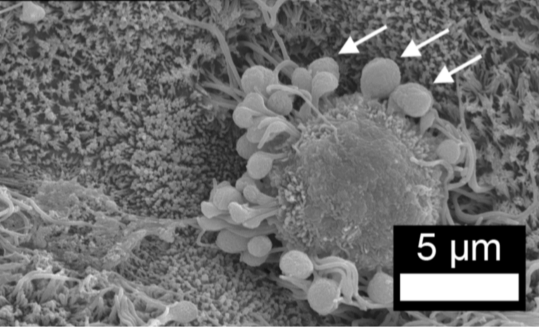 Figura 4. Producción de moco por cultivos diferenciados de células epiteliales traqueales ovinas. A) Los cultivos de células epiteliales traqueales ovinas se cultivaron a ALI interface aire-líquido, durante el número de días indicado (en relación con el establecimiento de ALI), se fijaron y procesaron para SEM. Los glóbulos de moco se indican con flechas blancas.